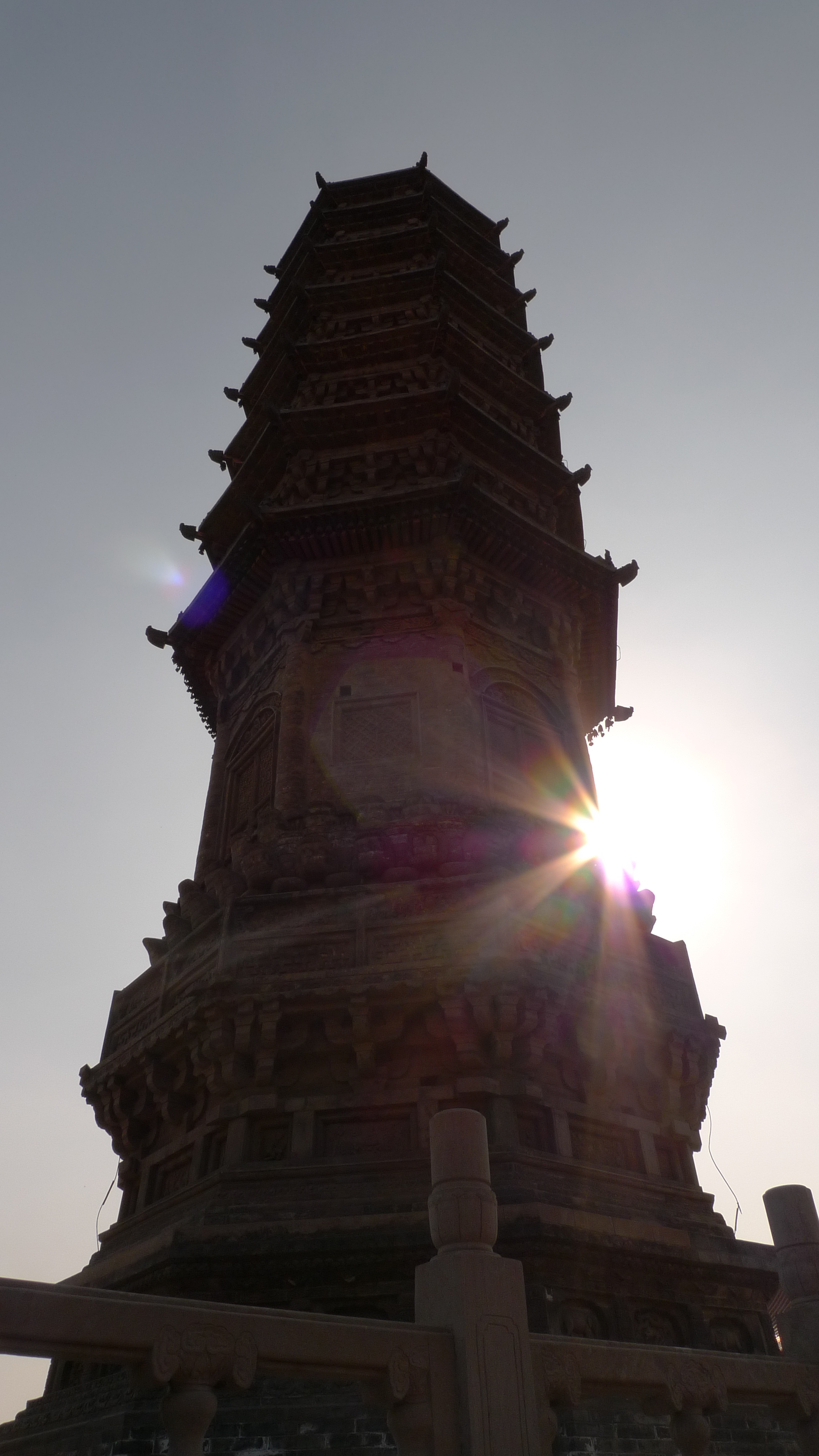 柏林禅寺舍利塔